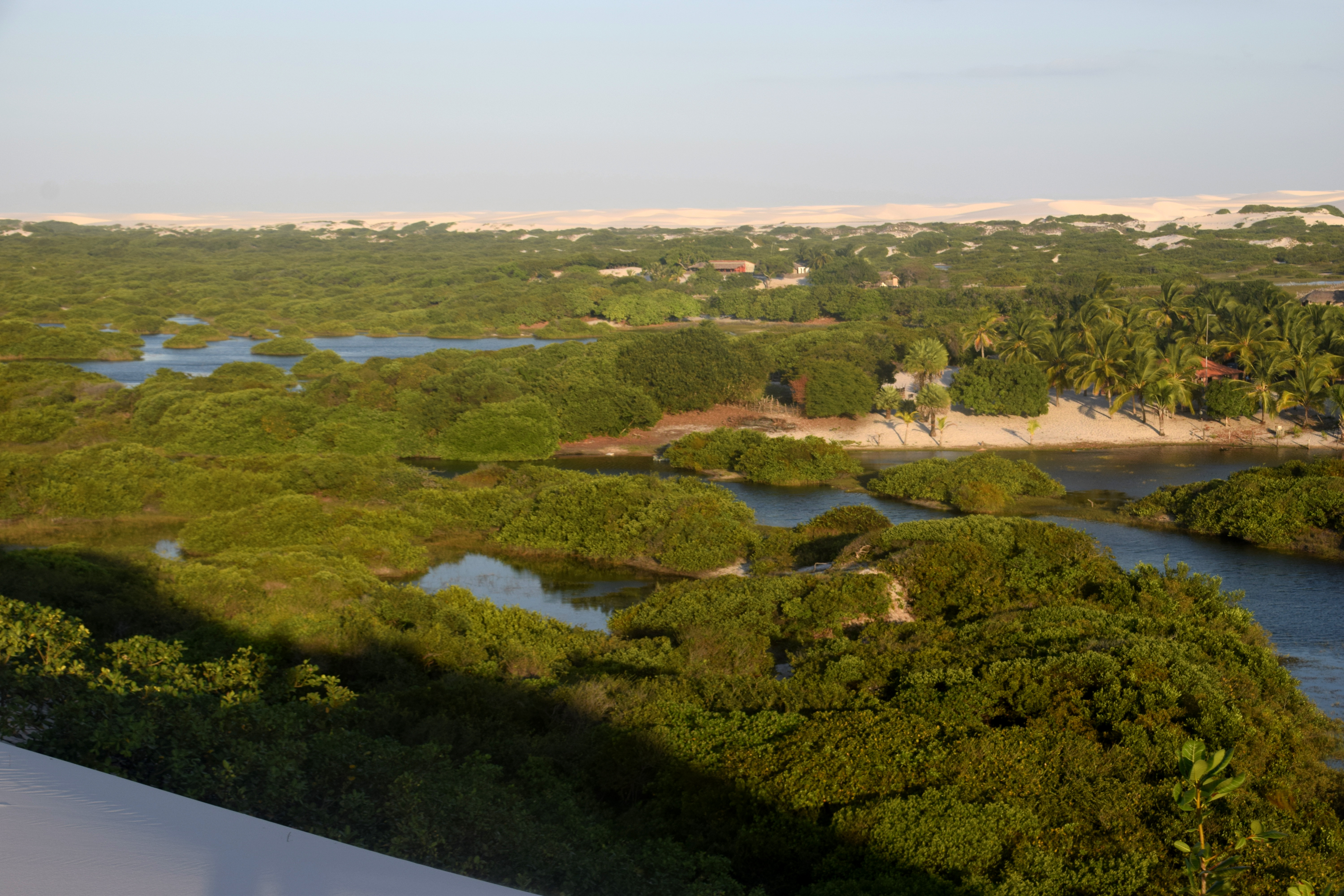 Parque Nacional dos Lençois Maranhenses de nível Federal, localizado (a) em Primeira Cruz (MA), Barreirinhas (MA)